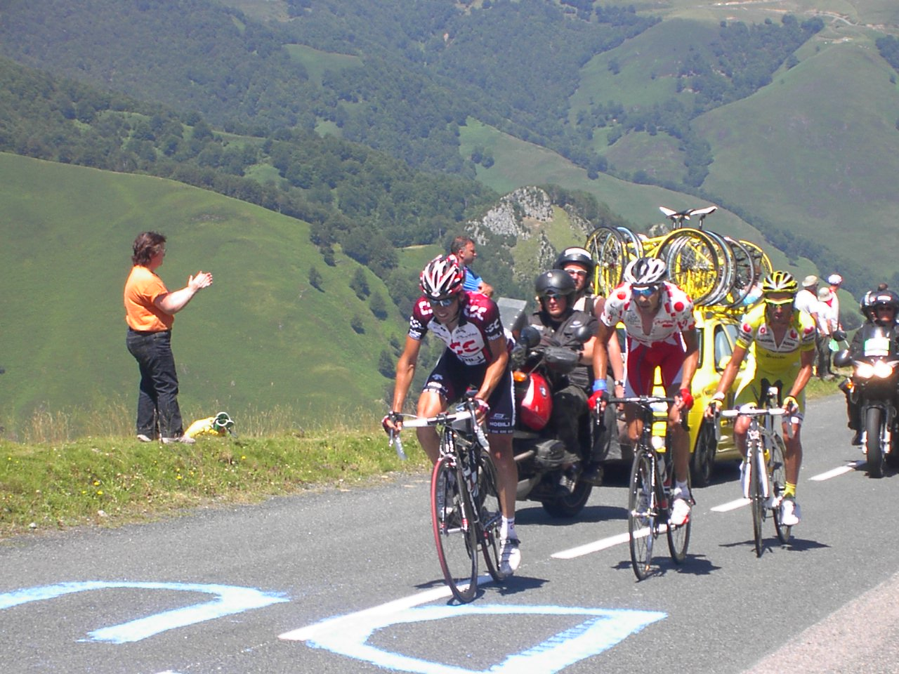 Port de Larrau-Tour de France 2007 (Carlos Sastre, Mauricio Soler and Iban Mayo, Stage 16)